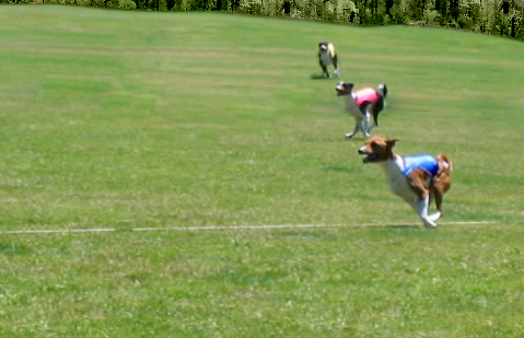 Lure coursing (hundesport) Mynder.